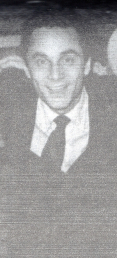 Jorge Luz.